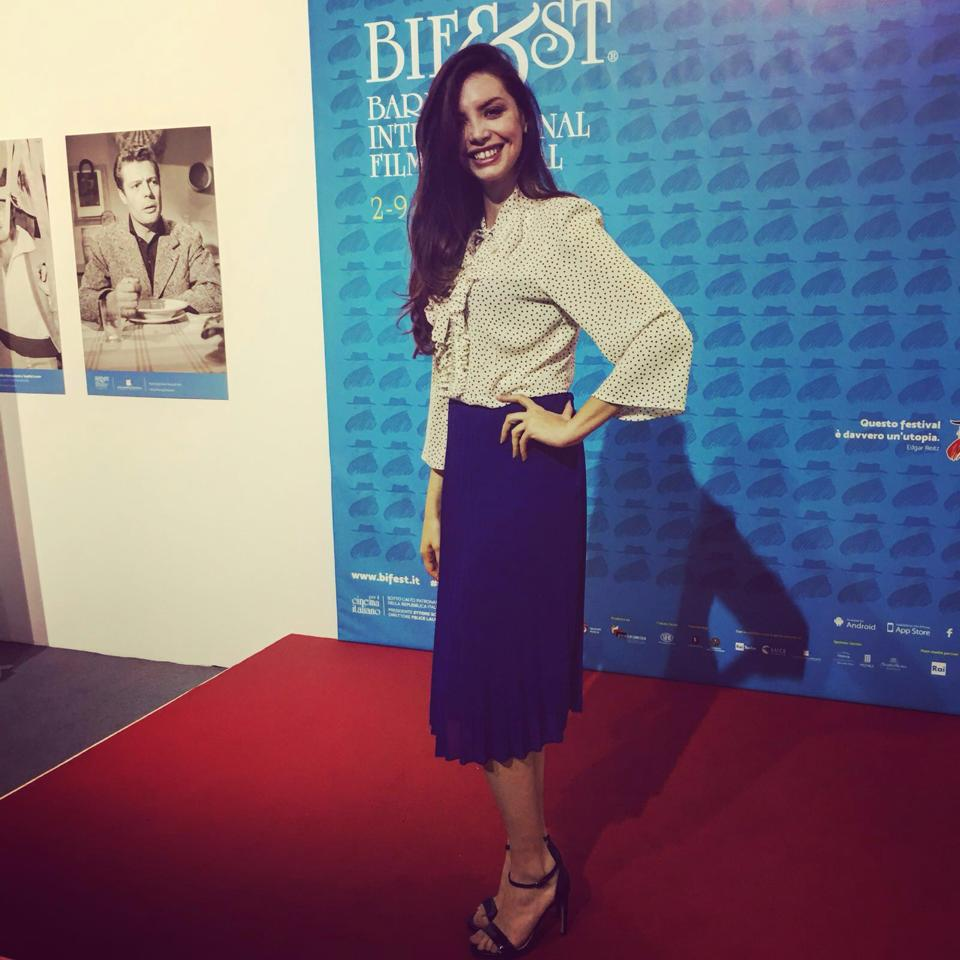 Ilenia Pastorelli al Bif&st 2016